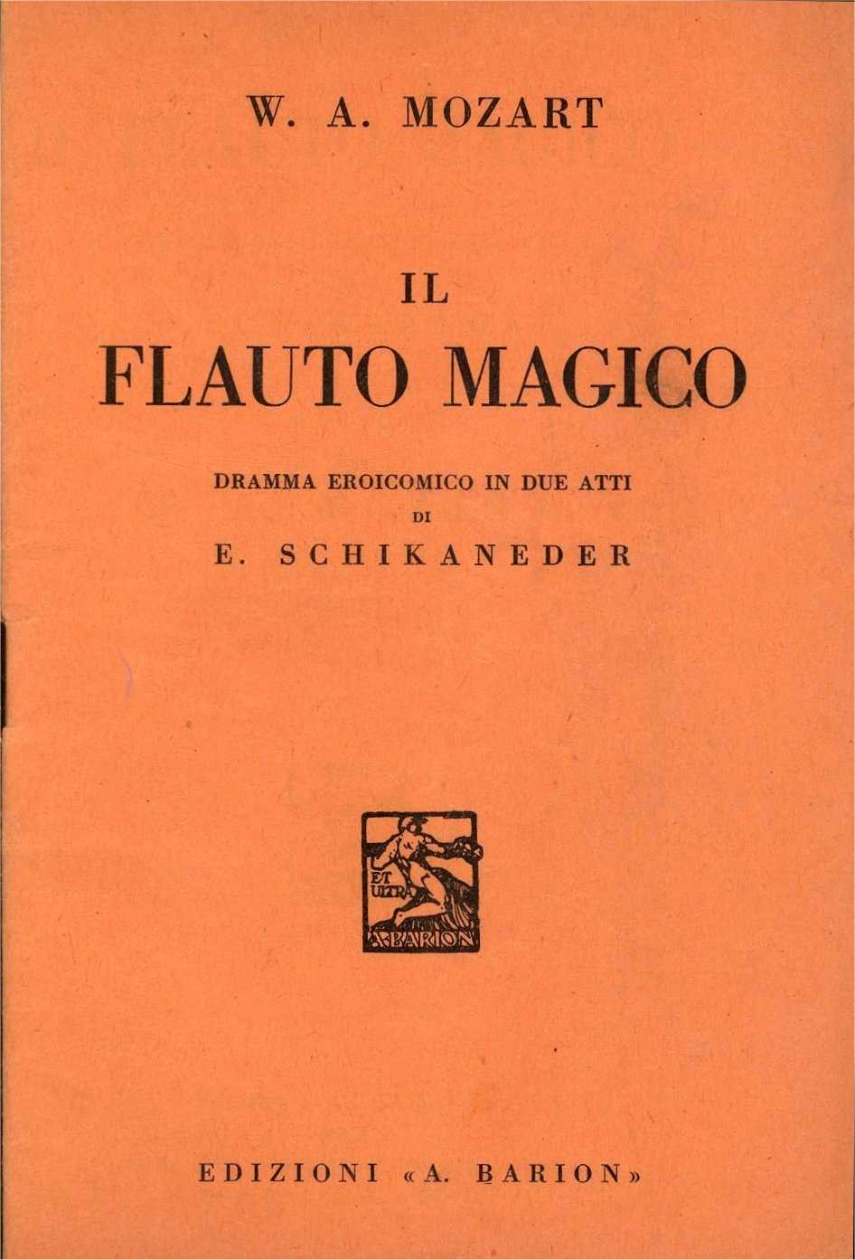 Copertina libretto "Il flauto magico" dramma eroicomico in due atti di E.S. Schikaneder musica di W. A. Mozart - editore Attilio Barion Sesto San Giovanni - Milano